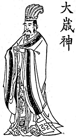 God of Taisai. 太歳神